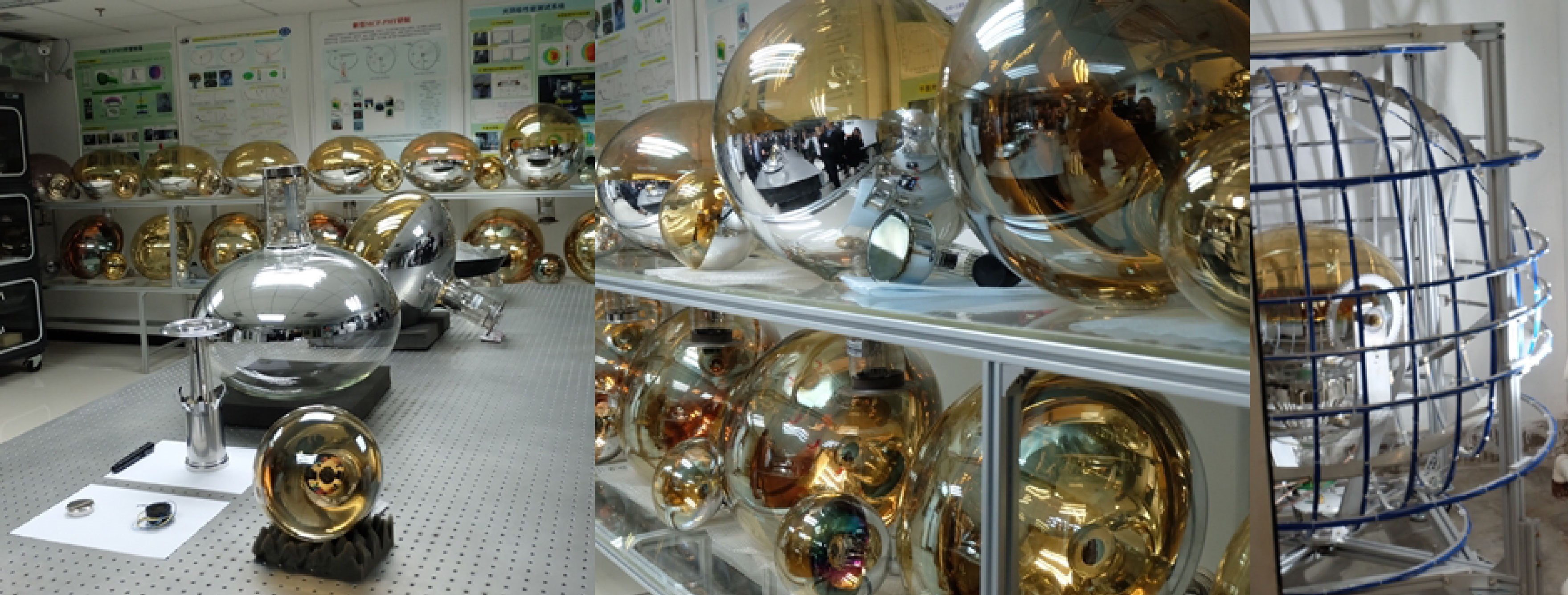 อุปกรณ์ชดเชยสนามแม่เหล็กโลก (Earth Magnetic Field Compensation Coil)